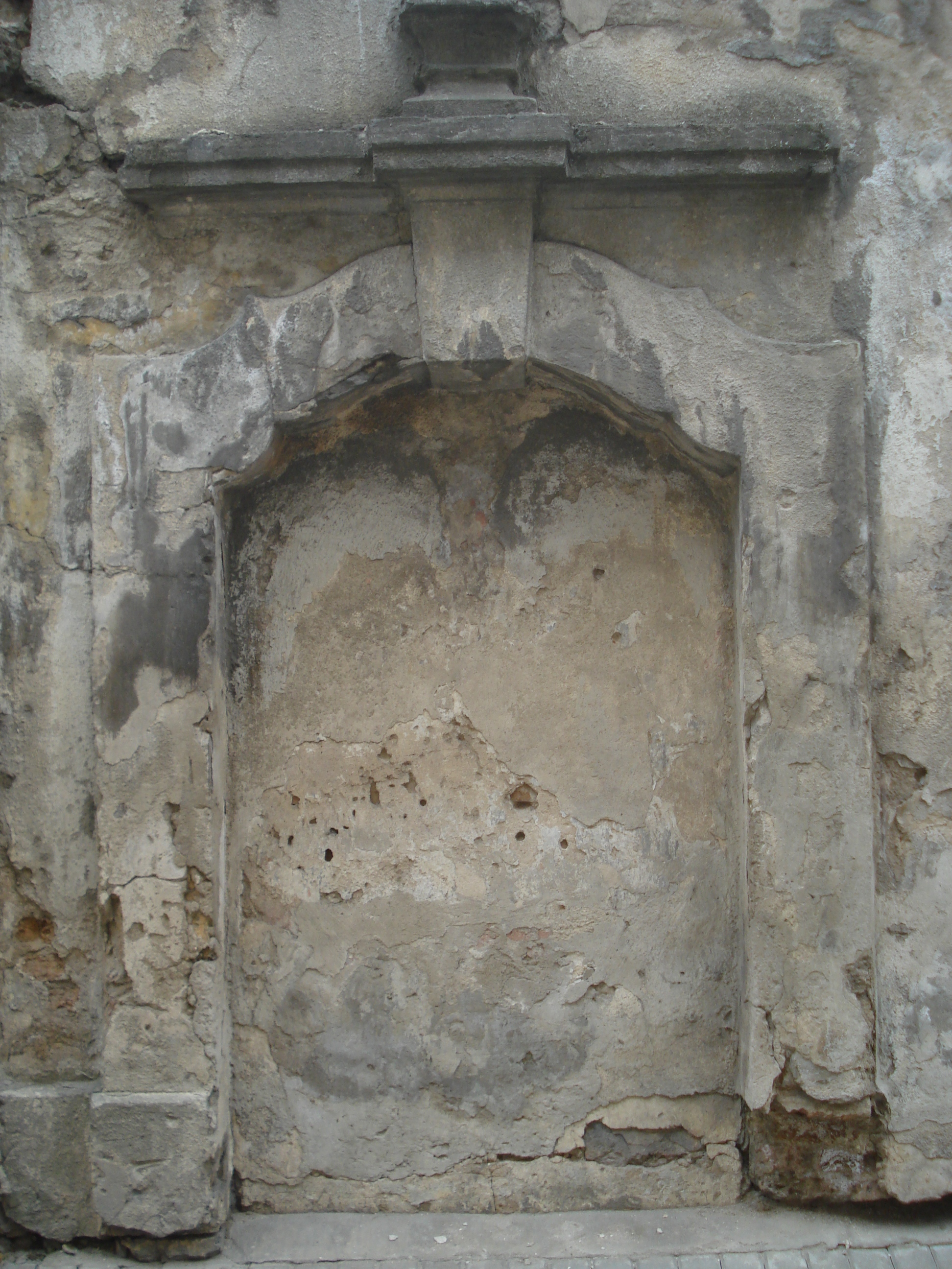 Bokšto gatvė (Bokshto street) in Vilnius